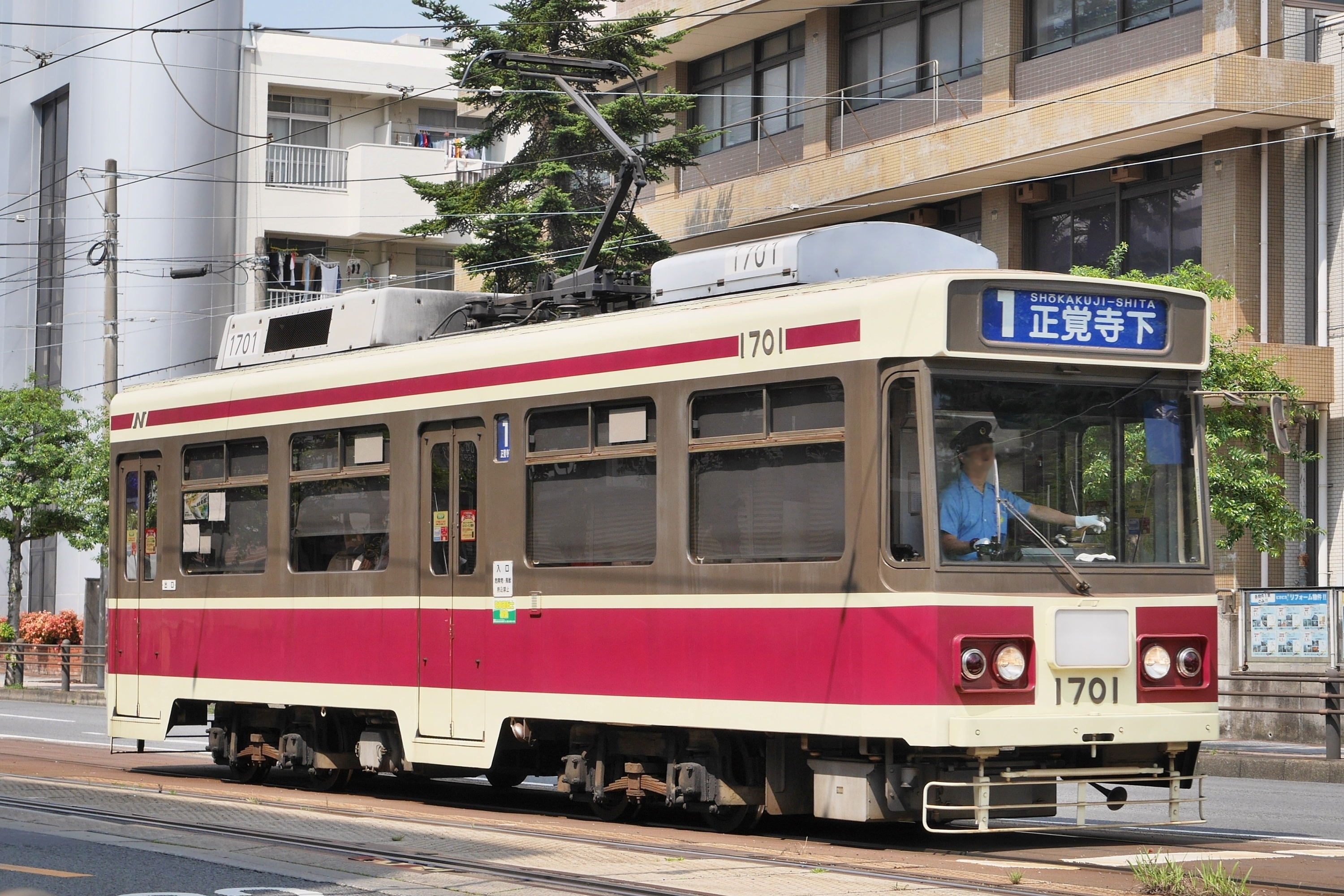 長崎電気軌道の路面電車車両1700形1701号。